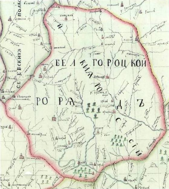 Карта Белгородского разряда Царство Русского